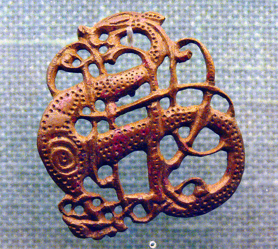 Bronzespænde fra Vikingetiden (ca. 1000-tallet). Nationalmuseet, København